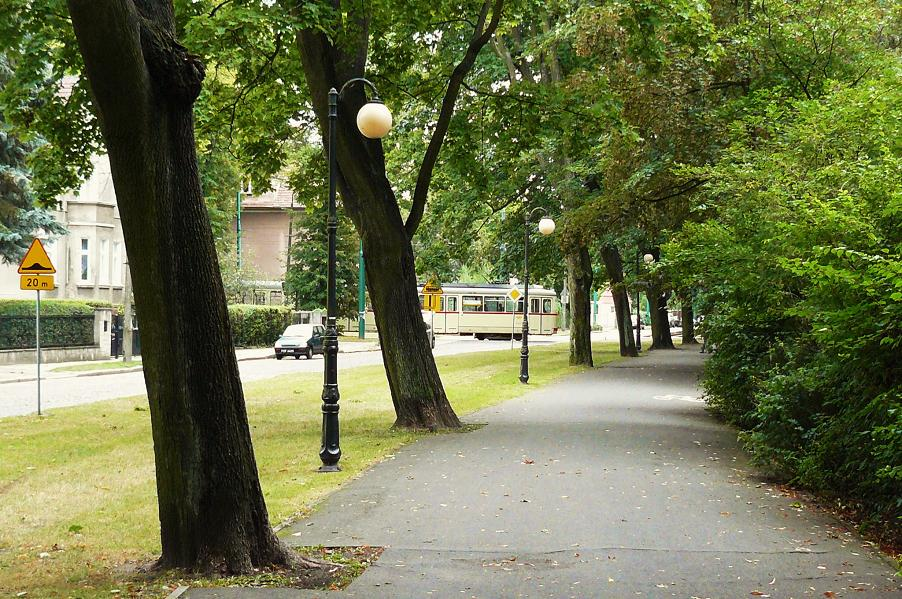 Fragment Sołacza - założenie urbanistyczne J.Stubbena.